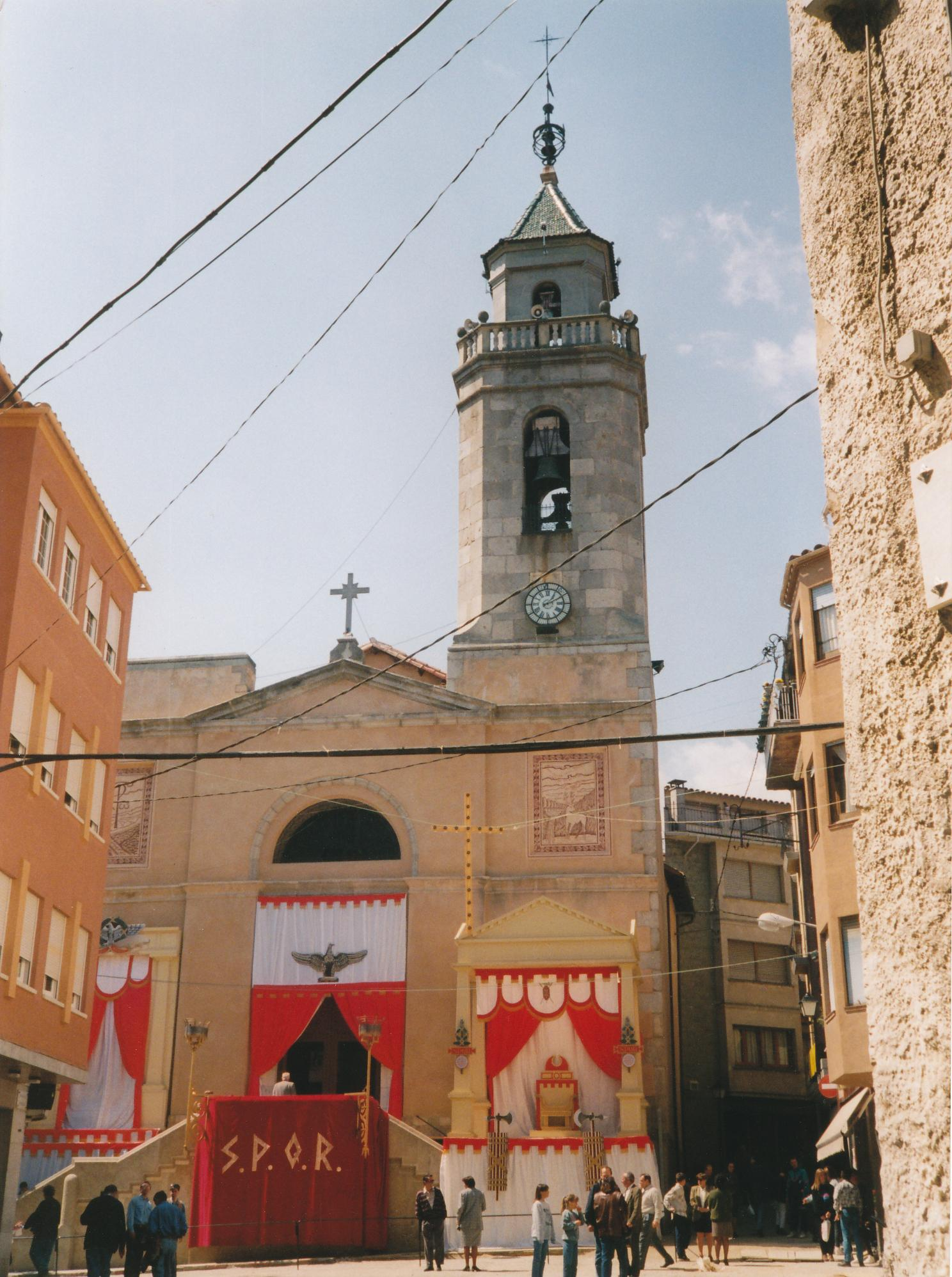 Sant Hilari Sacalm - Passionsspiel "Via Crucis Vivent" Datum: 04/1995 (Karfreitag) Urheber: Michael Pfeiffer Quelle: privates Fotoalbum des Urhebers